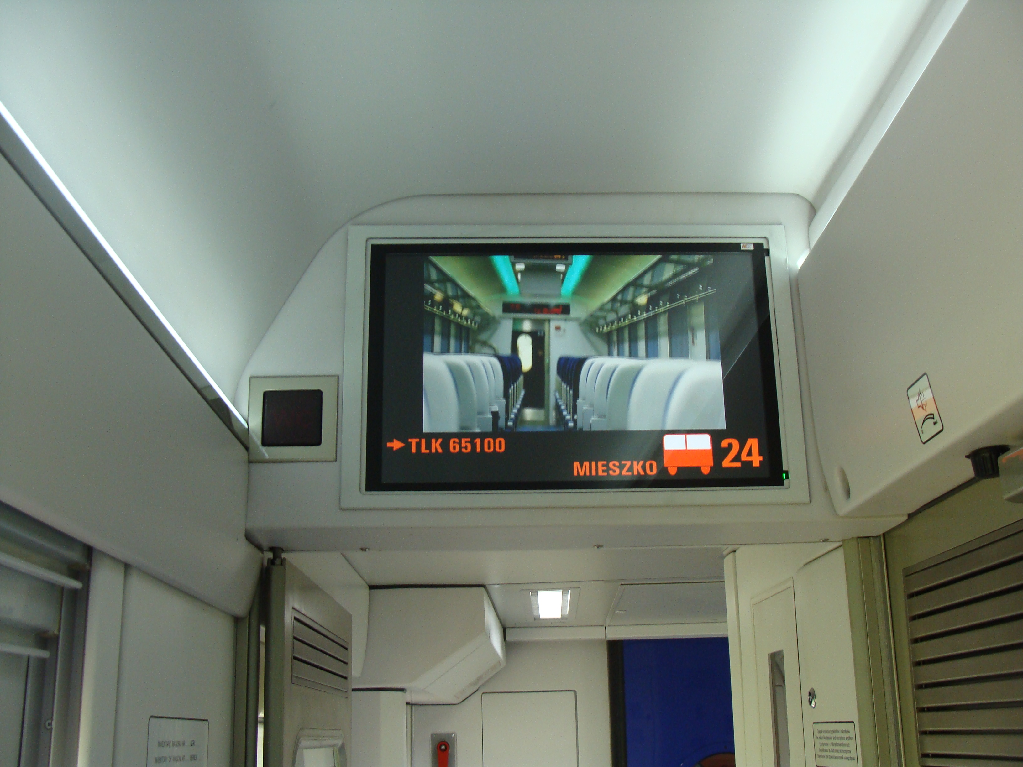 Monitor systemu informacji pasażerskiej w wagonie typu 166A